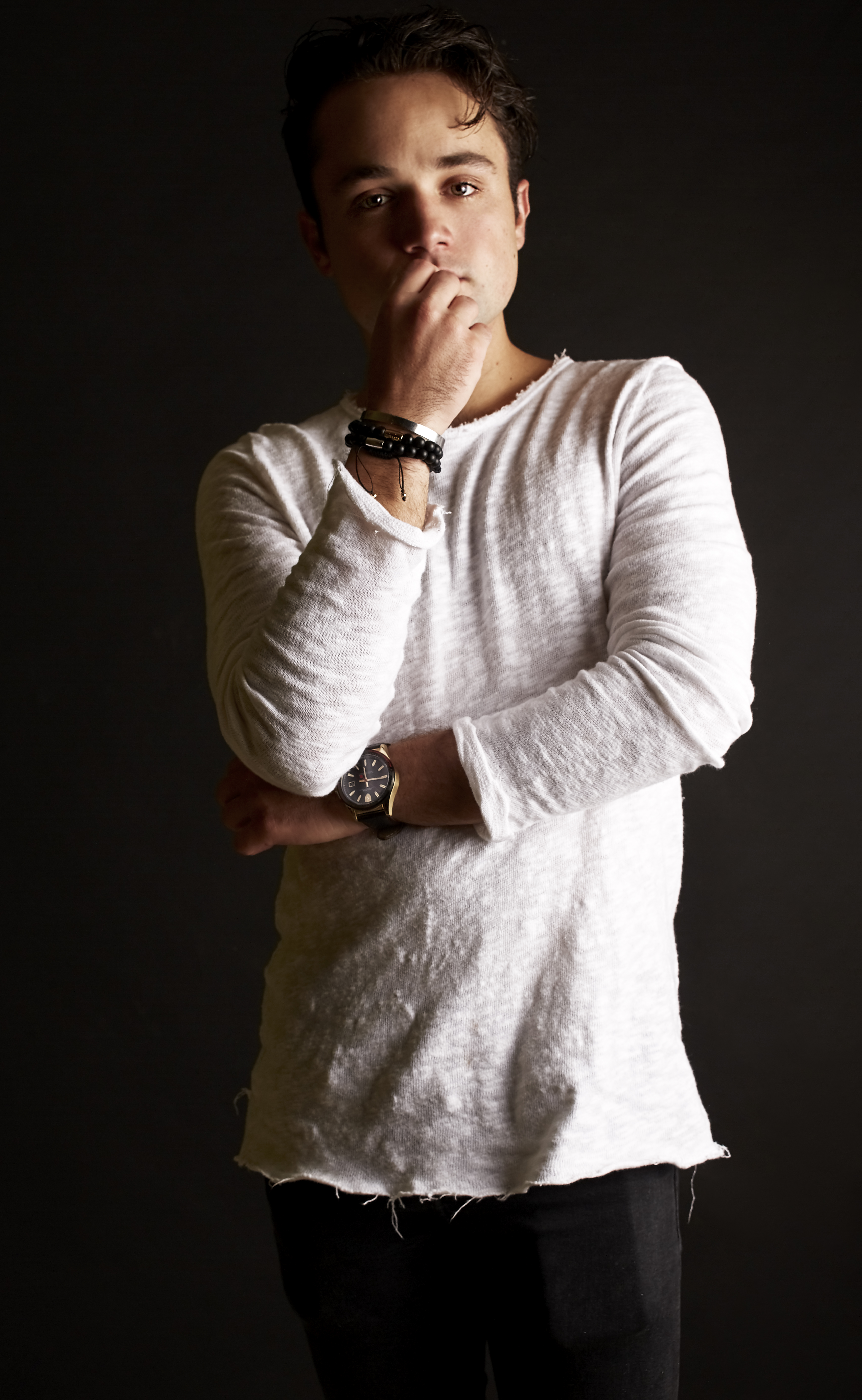 Sesión de fotos por Diego Eureza